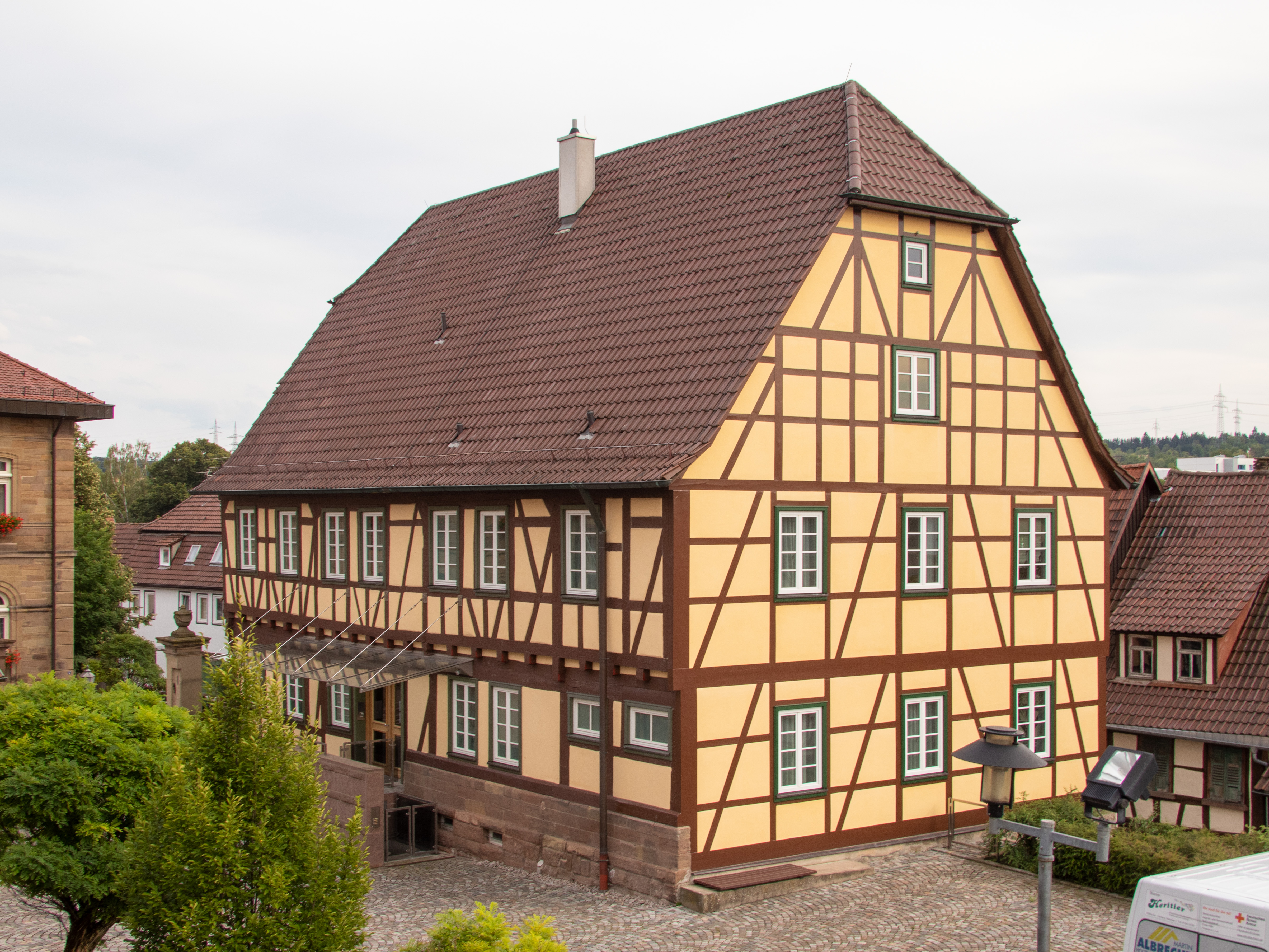 Westgiebel und Traufe zum Hof des als Denkmal geschützten Hauses in der Schöneberger Straße 1, Ötisheim